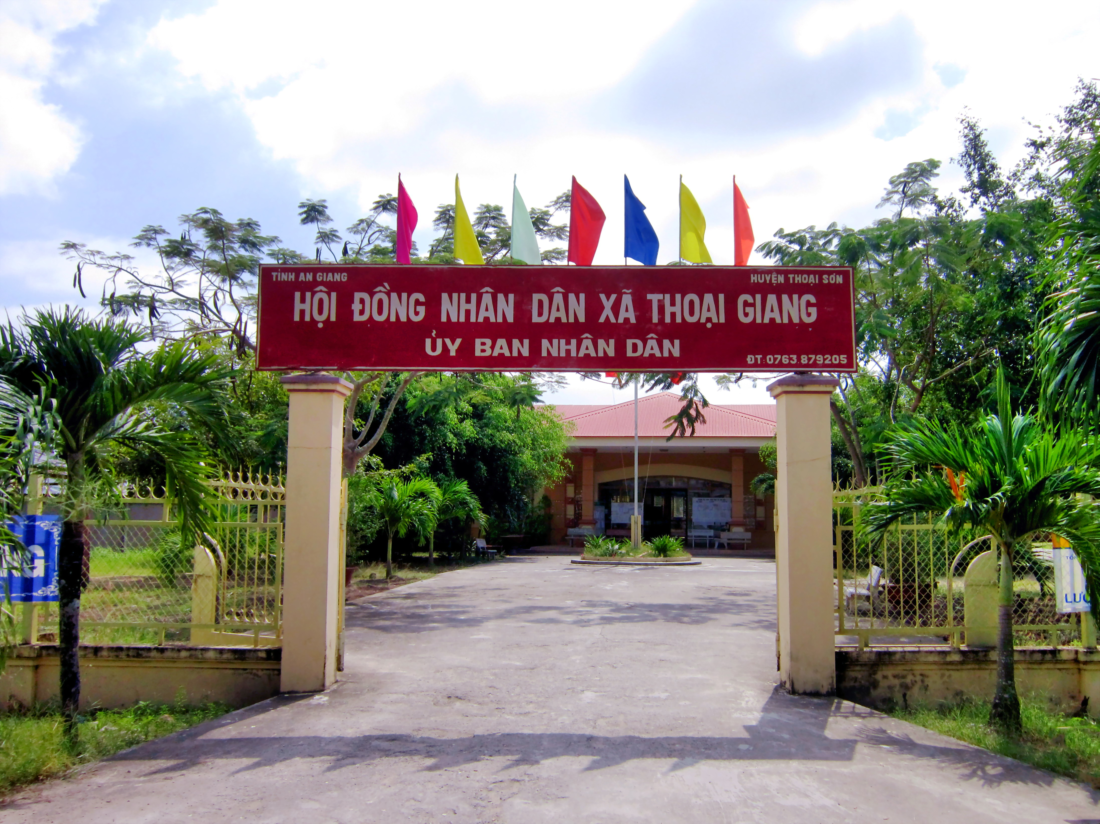 Ủy ban Nhân dân xã Thoại Giang, thuộc huyện Thoại Sơn, An Giang, Việt Nam.